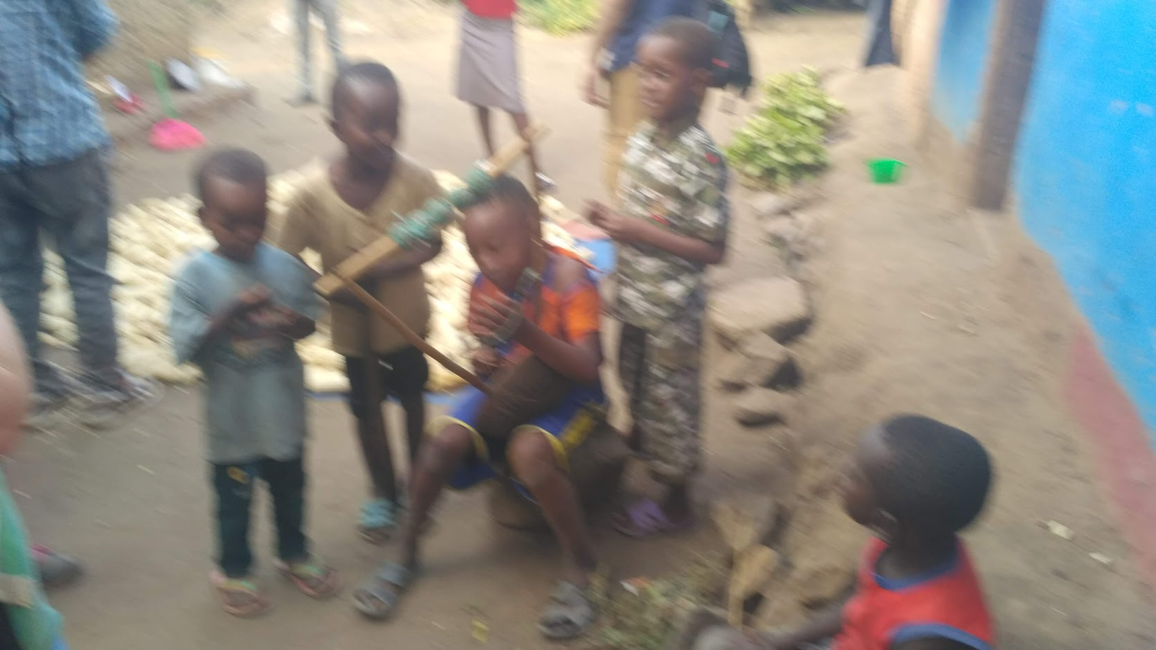 ילדי מינגי משחקים בחצר בית היתומים בעיר ג'ינקו באתיופיה